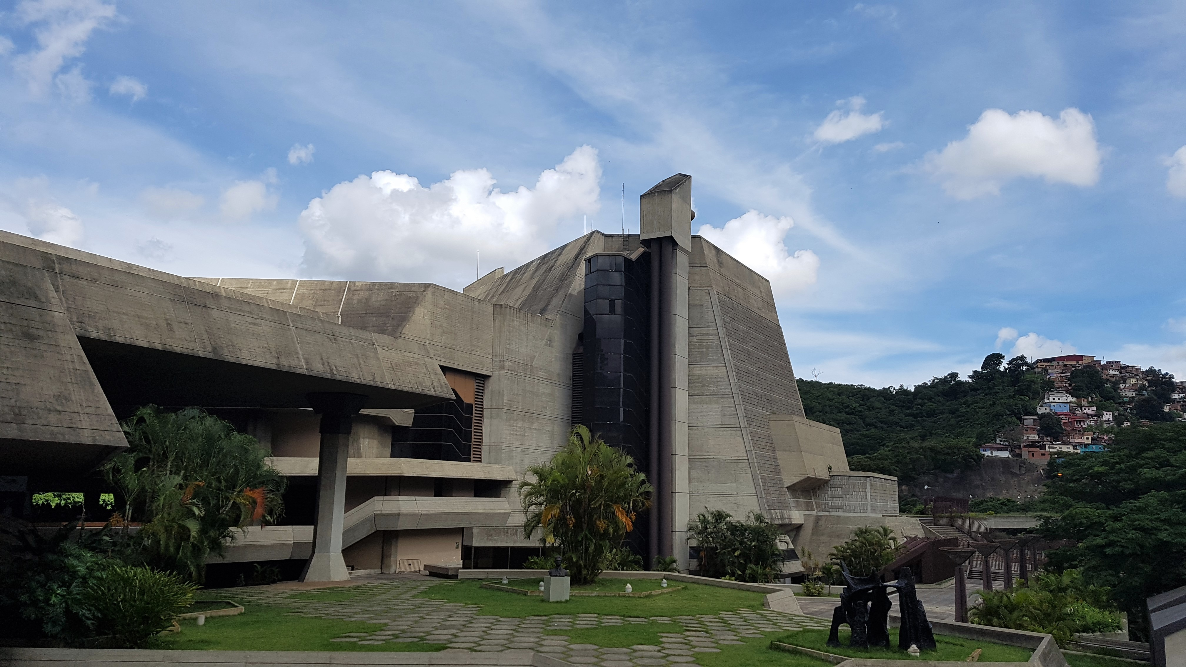 Teatro Teresa Carreño